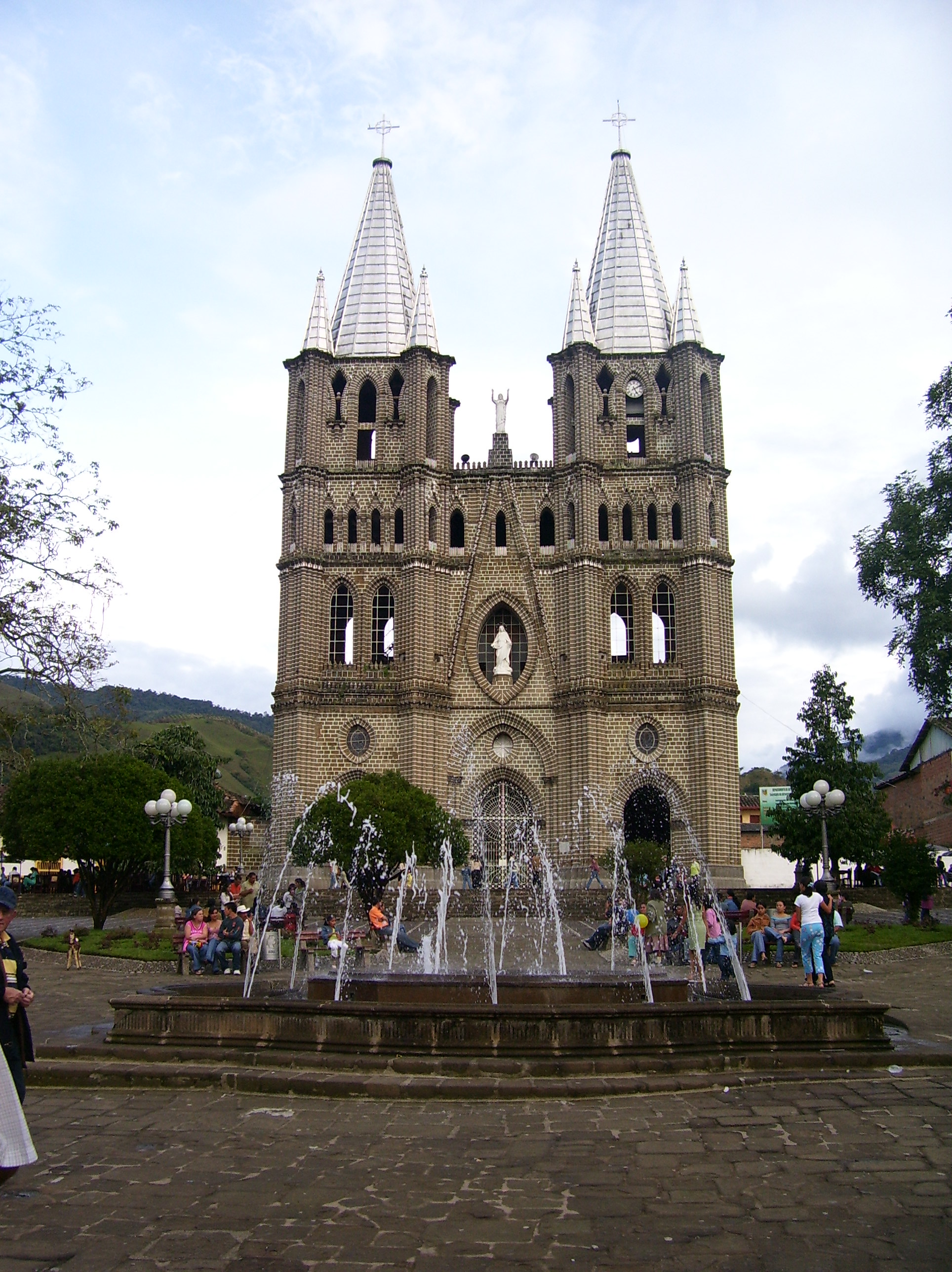 Iglesia en la Plaza Principal del Municipio el Jardín